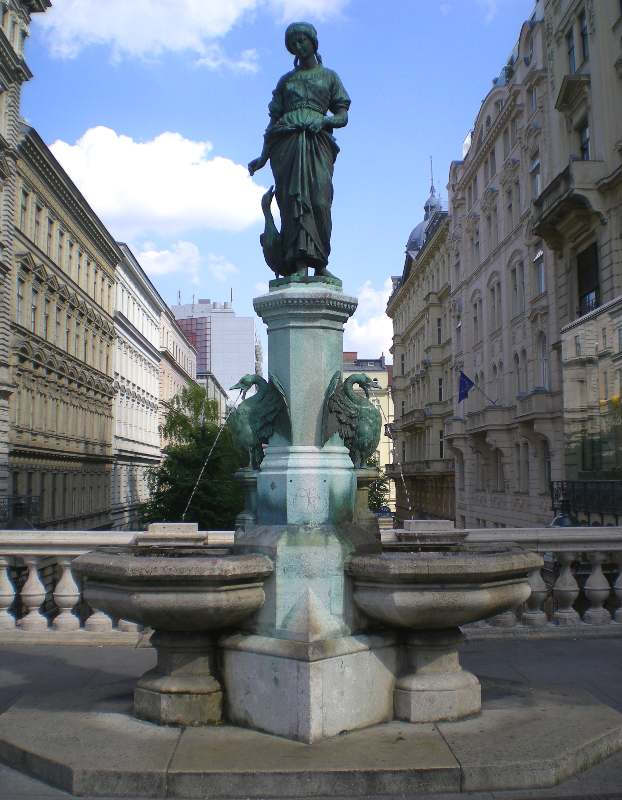 Der denkmalgeschützte Gänsemädchenbrunnen bei der Rahlstiege an der Mariahilfer Straße im 6. Wiener Gemeindebezirk Mariahilf